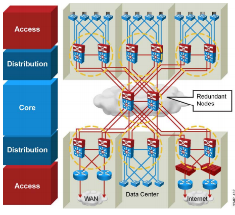 Монгол: ыужэнхаөб